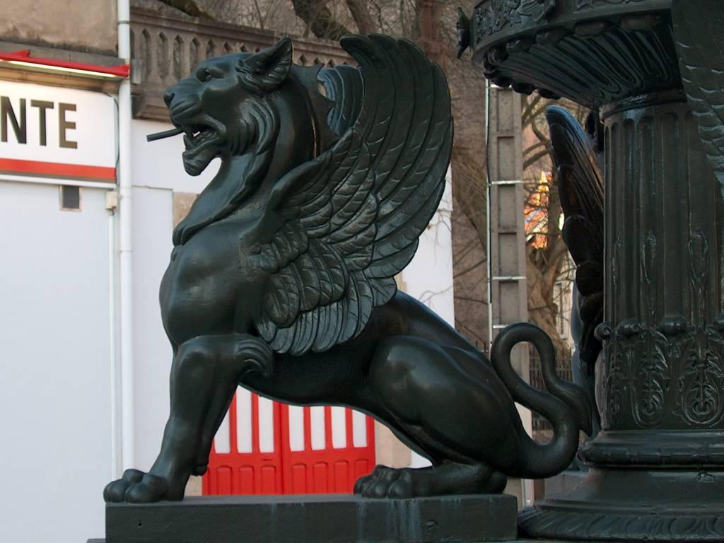 Lion ailé, emblème de Raon-l'Étape, dans les Vosges, en France